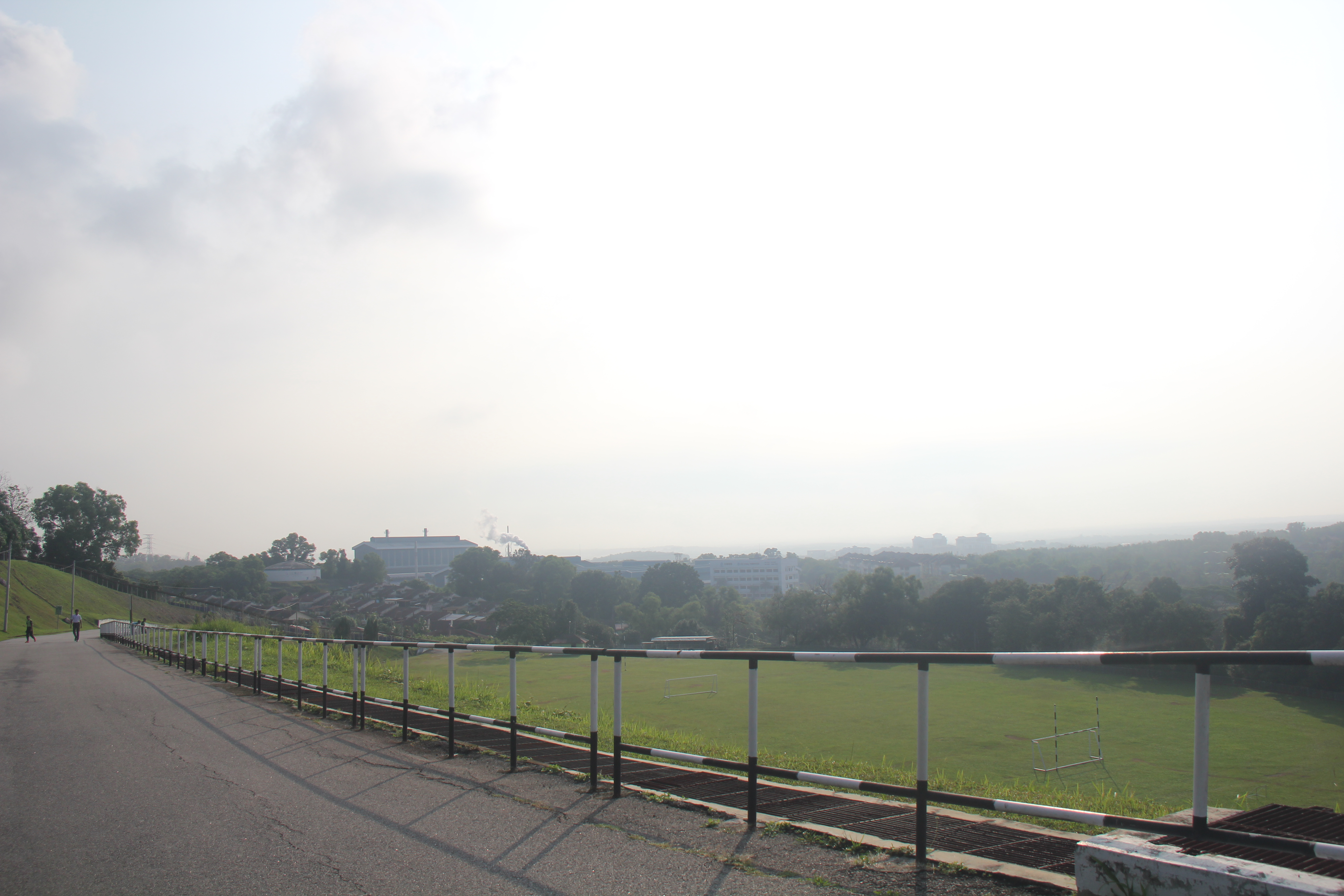 Copyright Protected Taken by Syaddad Nabil Shamsullah Victorious 1317